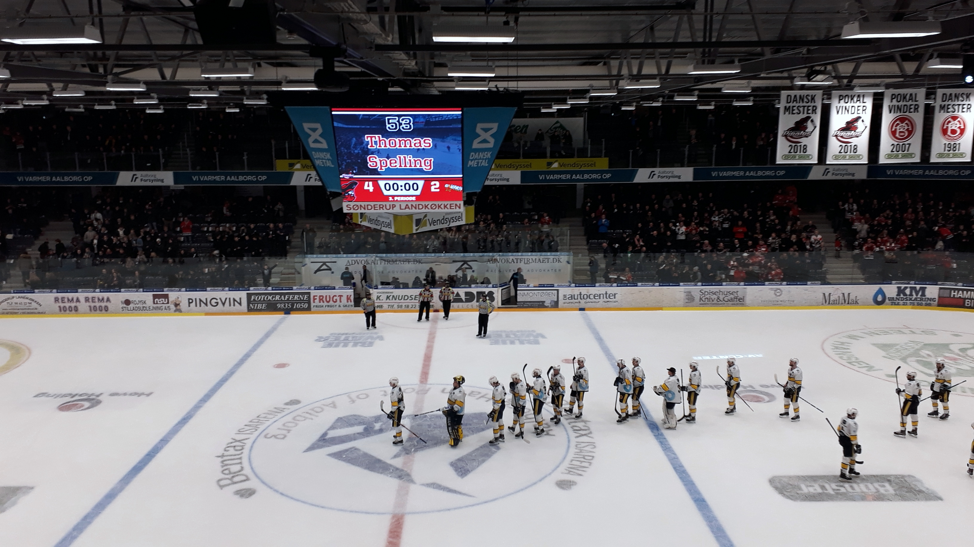 Esbjerg Energy spillere i Gigantium, Aalborg